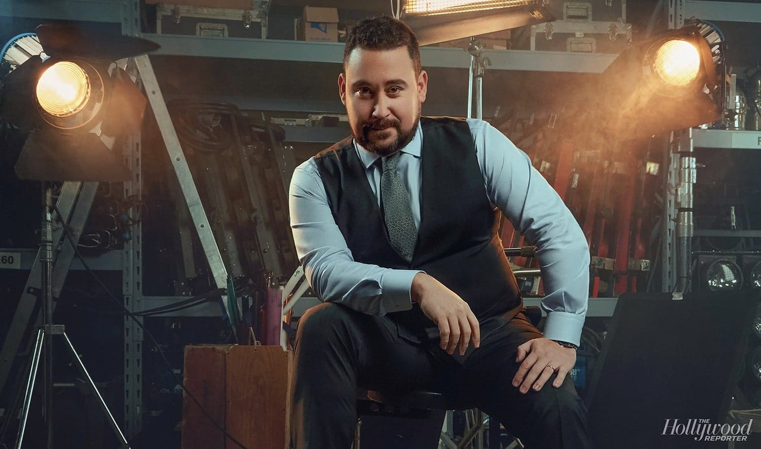 Victor Perez nel 2019